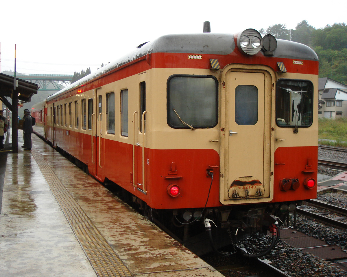 ほっとゆだ駅に停車中の横手行き臨時快速「錦秋湖号」（後部国鉄キハ52形100番台）